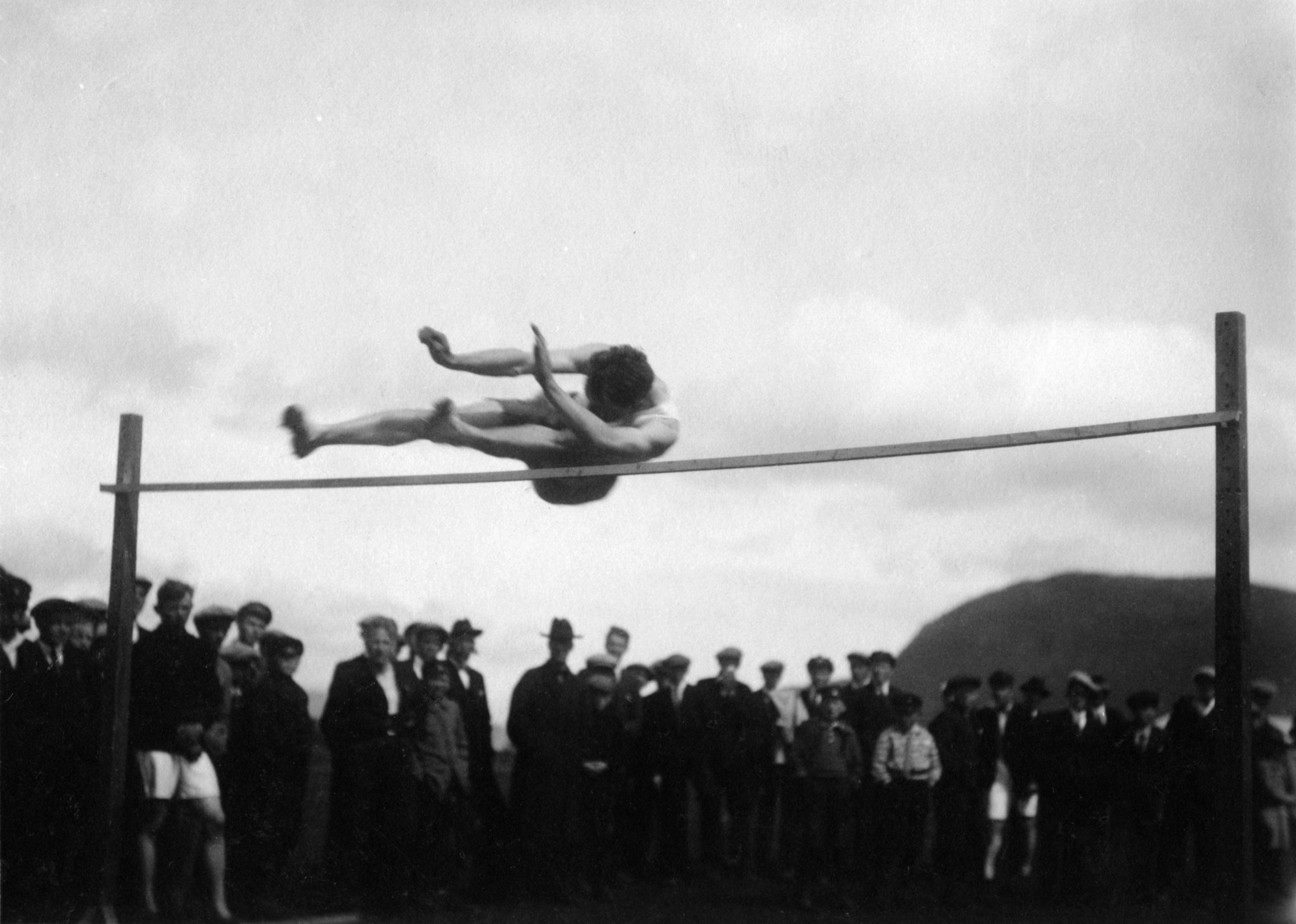 Oskar Midtlyng (1906–1994), friidrettsutøver.